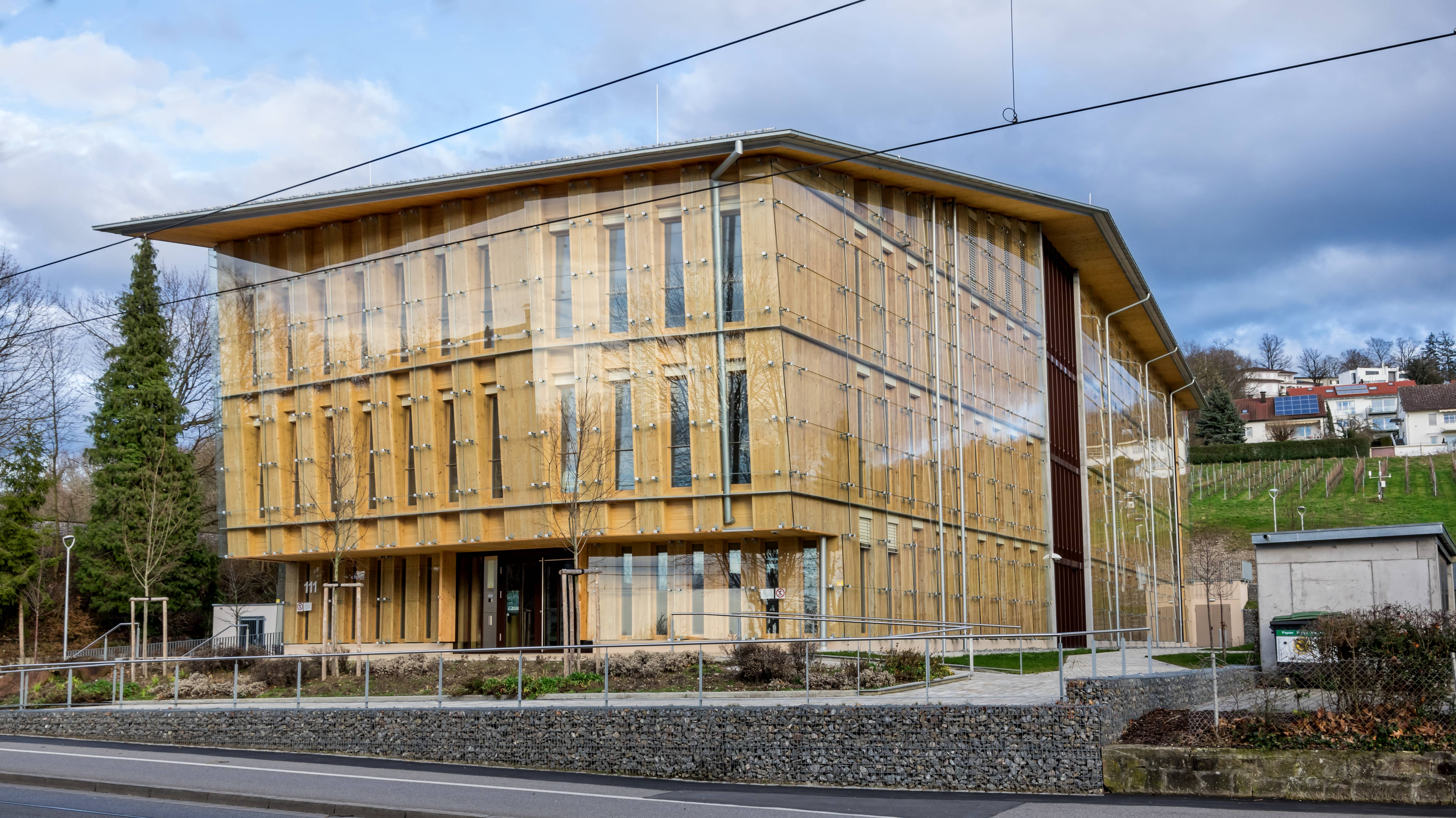 Bilder aus Freiburg im Breisgau, das Haus der Bauern in der Merzhauserstraße